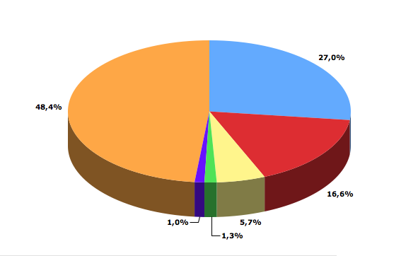 Religies in Nederland in 2006